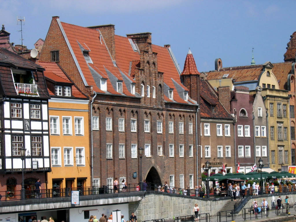 Gdansk, Poland, Brama Chlebnicka (Chlebnicka Gate)